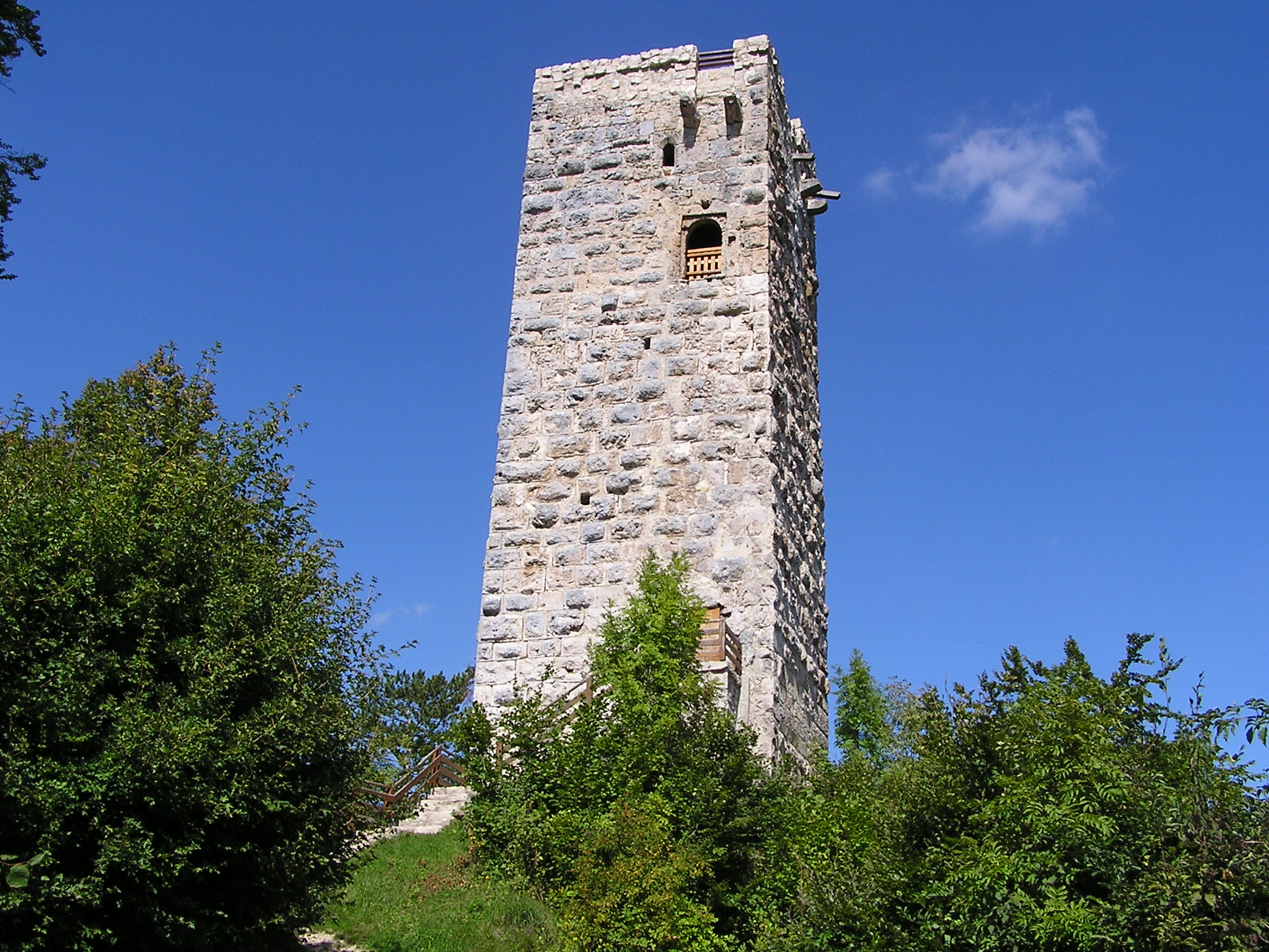 Bergfried der Burg Hohenschelklingen auf dem Schlossberg in Schelklingen, selbst Fotografiert, 05.09.2006, Alexander Förstner